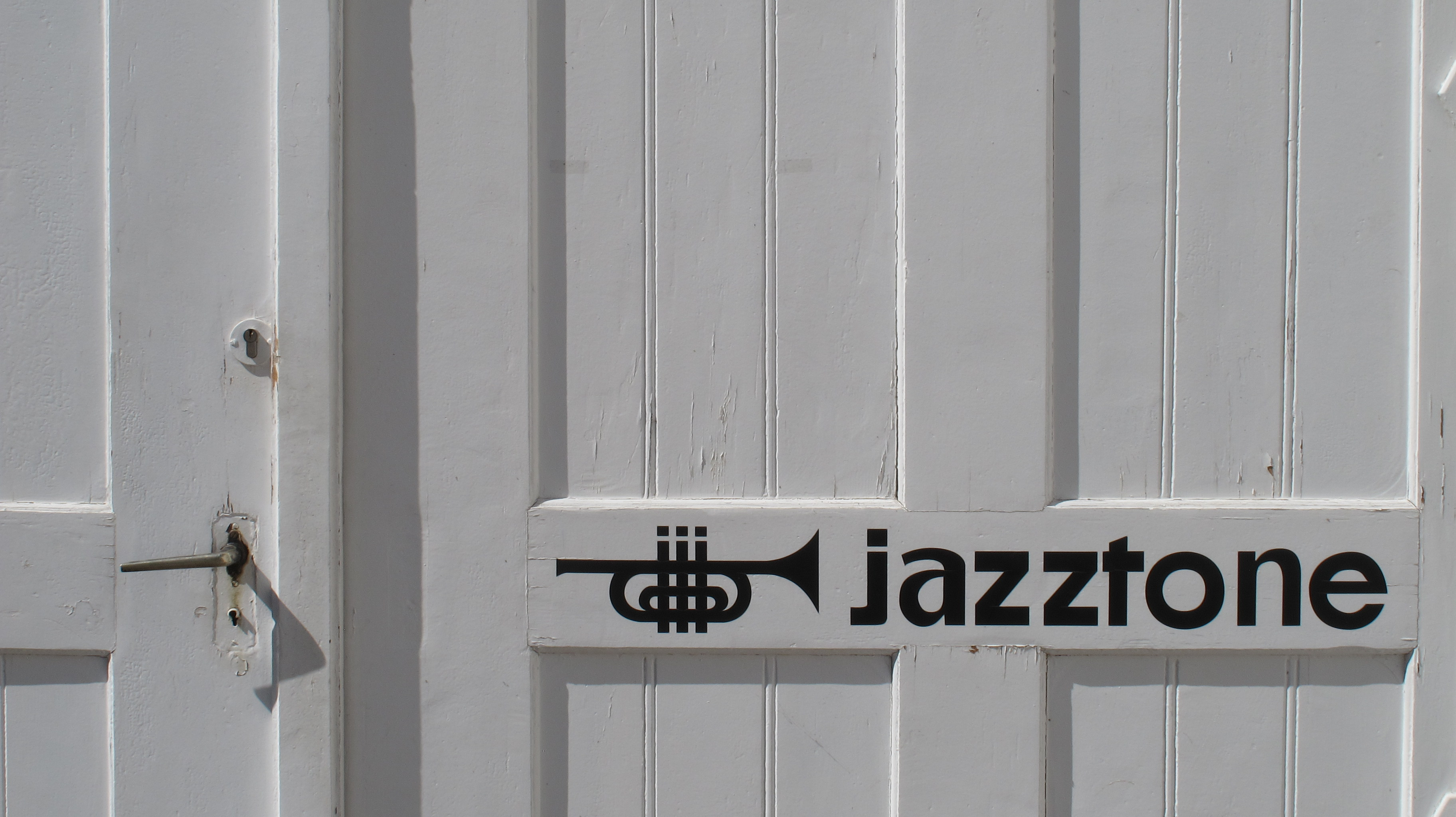 Eingangstür zum Jazztone Lörrach mir Logo